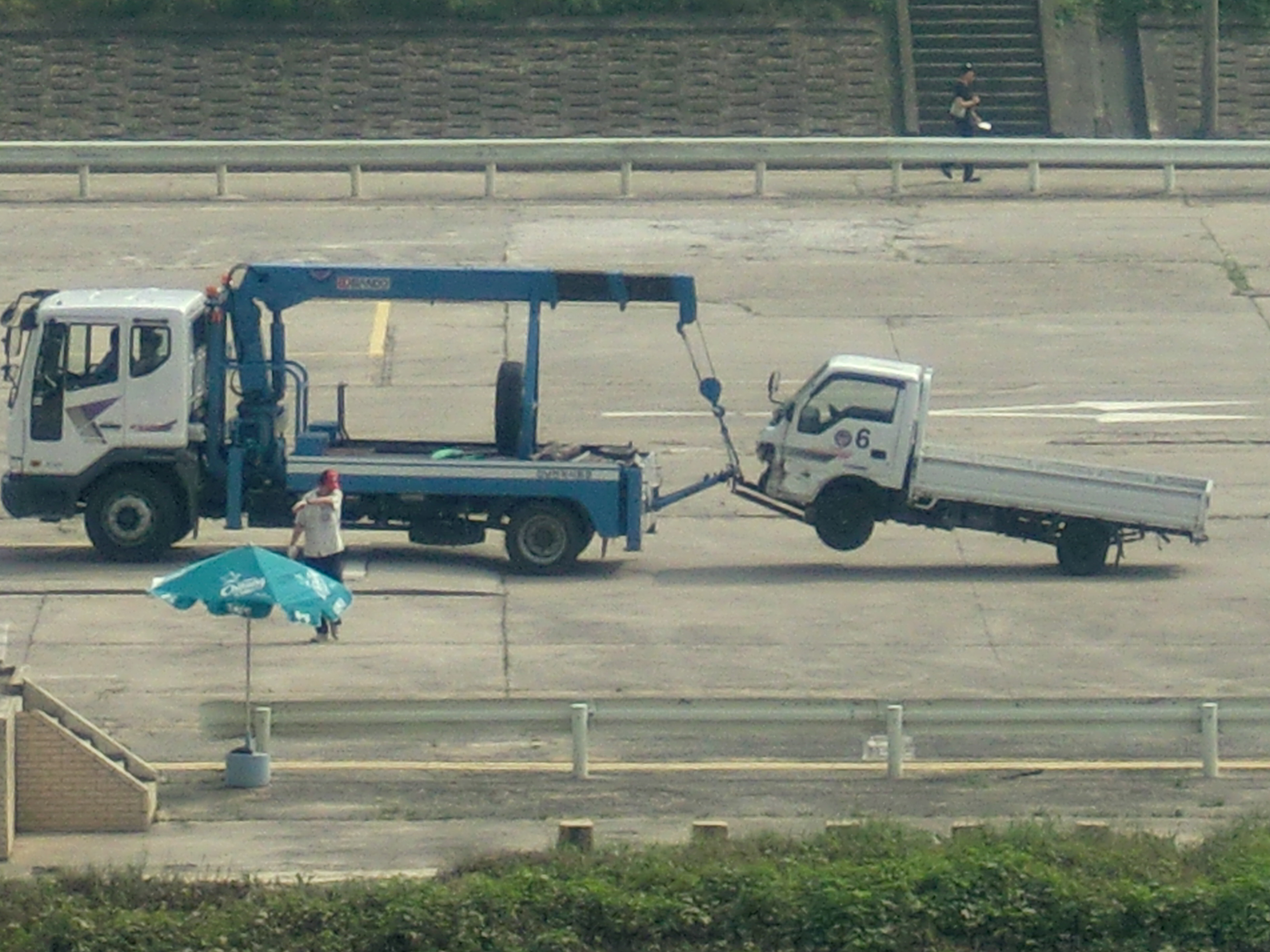 강남운전면허시험장에서 특수면허 (레카)의 기능시험